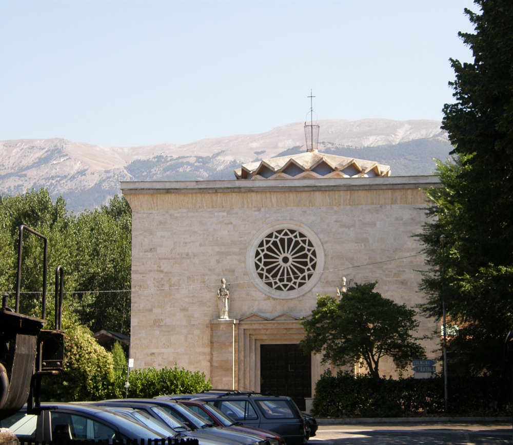 Sulmona